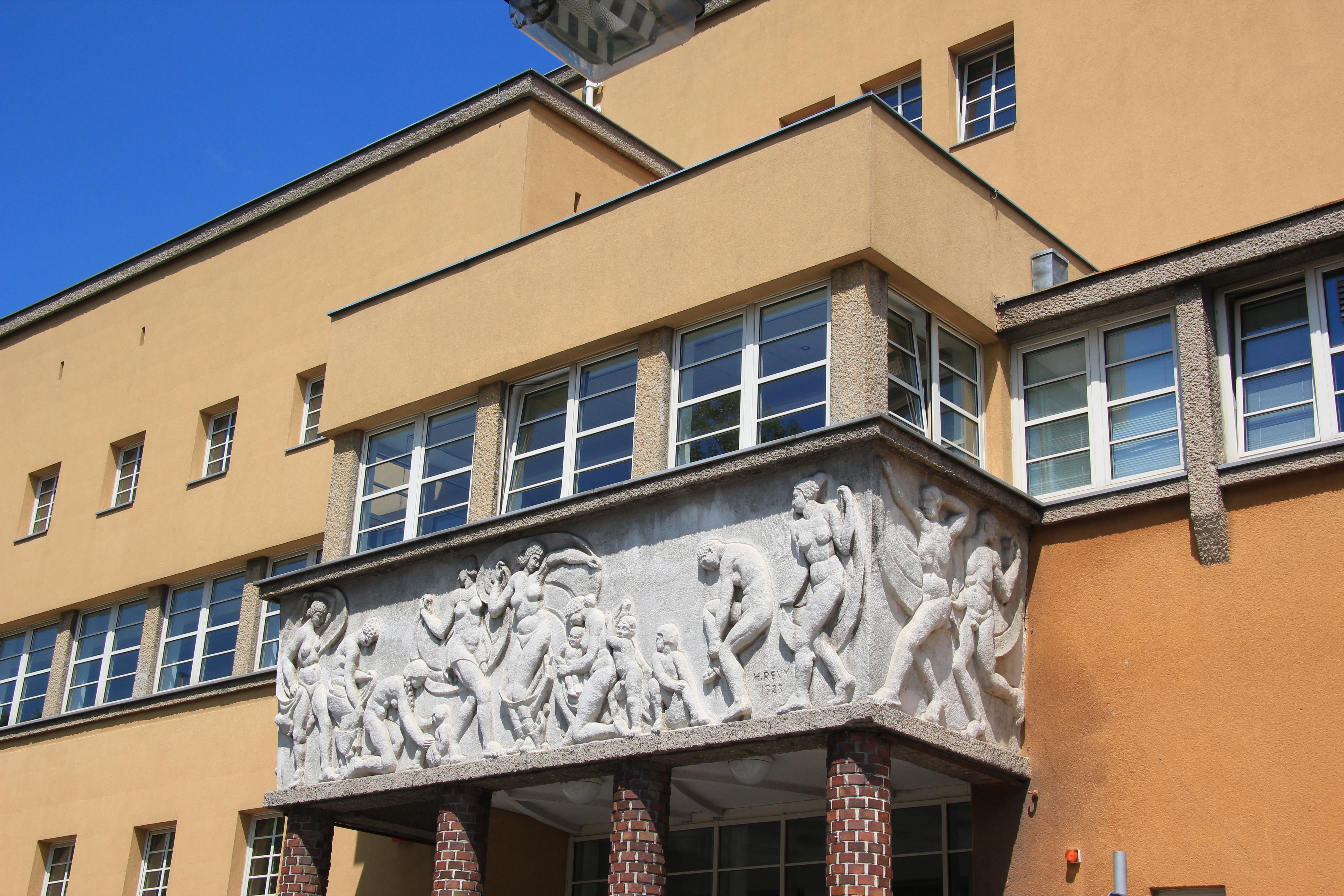 Denkmalgeschütztes Stadtbad in Mödling, Niederösterreich, mit Relief von Karl Julius Heinrich Revy